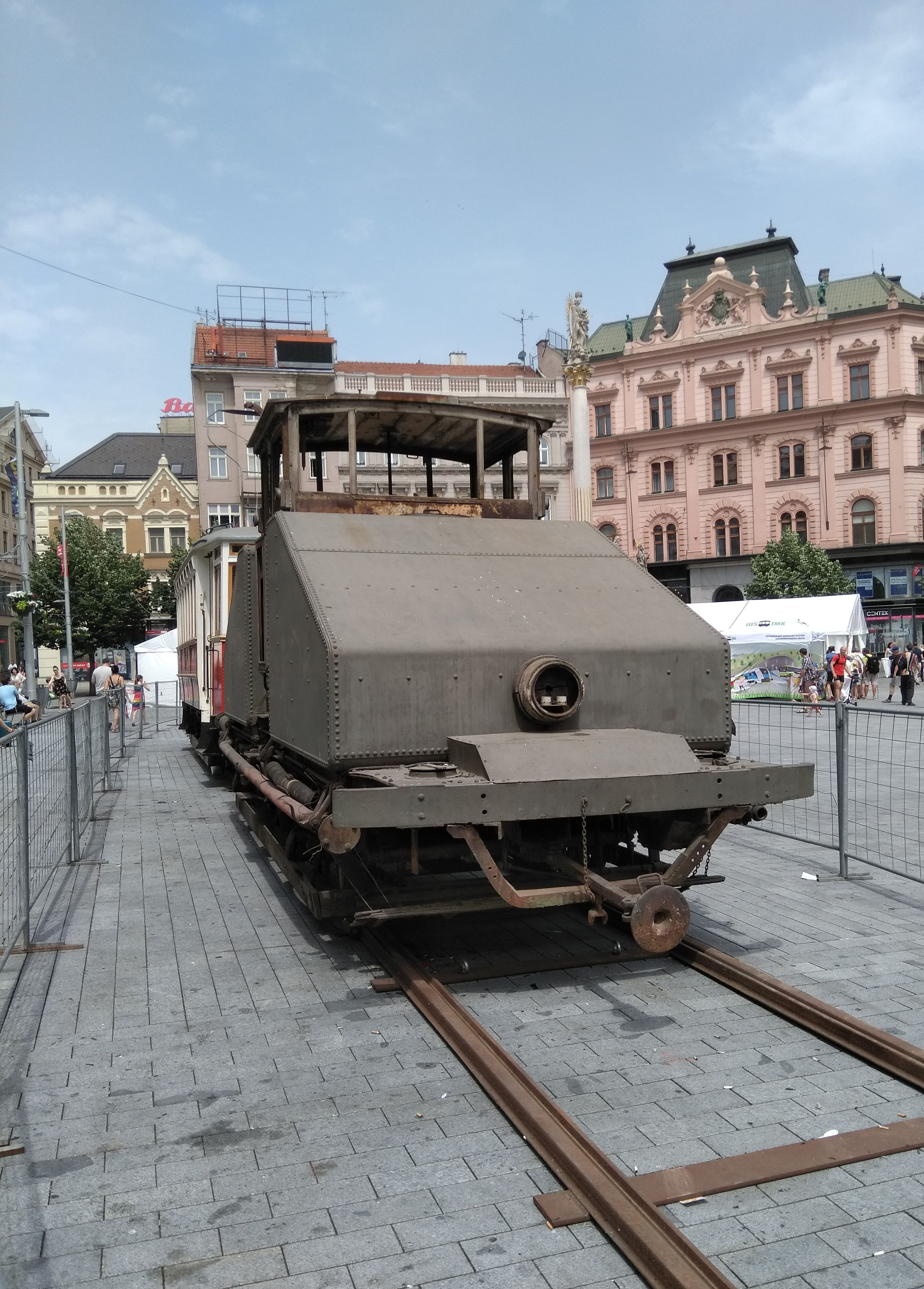 Kropicí vůz č. 3 vystavený při příležitosti 150. výročí MHD v Brně na náměstí Svobody v rámci Dopravní nostalgie konané v červnu 2019.